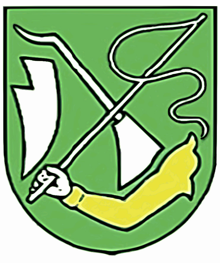 Erb obce Horná Kráľová